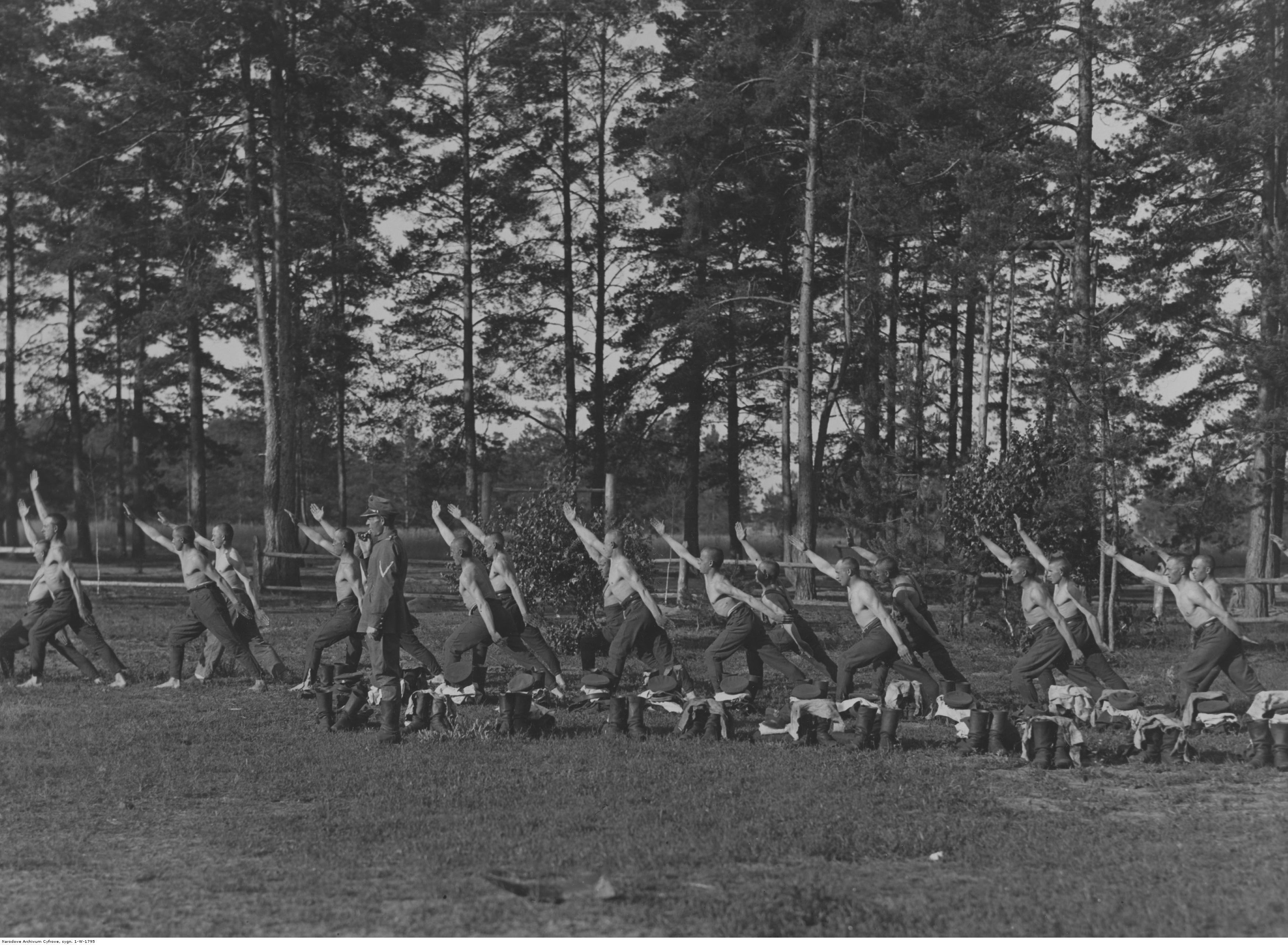 Gimnastyka poranna w oddziale rezerwowym Korpusu Ochrony Pogranicza w strażnicy "Lenin" na granicy polsko-radzieckiej. Koncern Ilustrowany Kurier Codzienny - Archiwum Ilustracji. Sygnatura: 1-W-1795